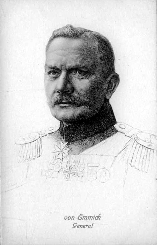 von Emmich